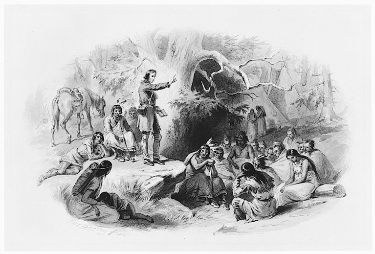 Drawing; Drawings